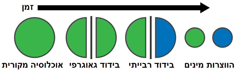 ספציאציה אלופטרית